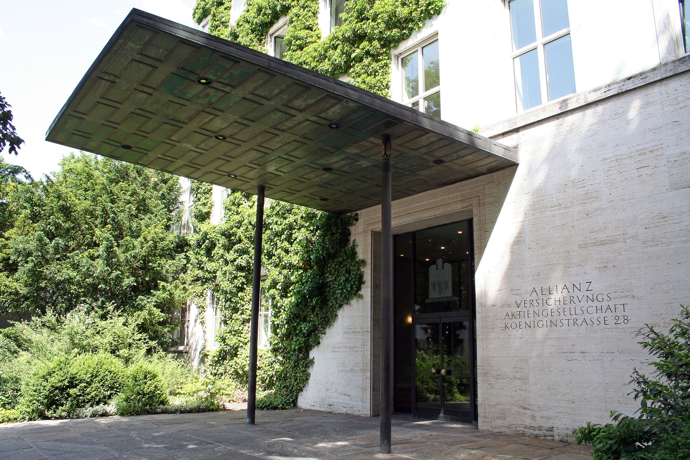 Eingang Allianz Königinstr. 28 in München